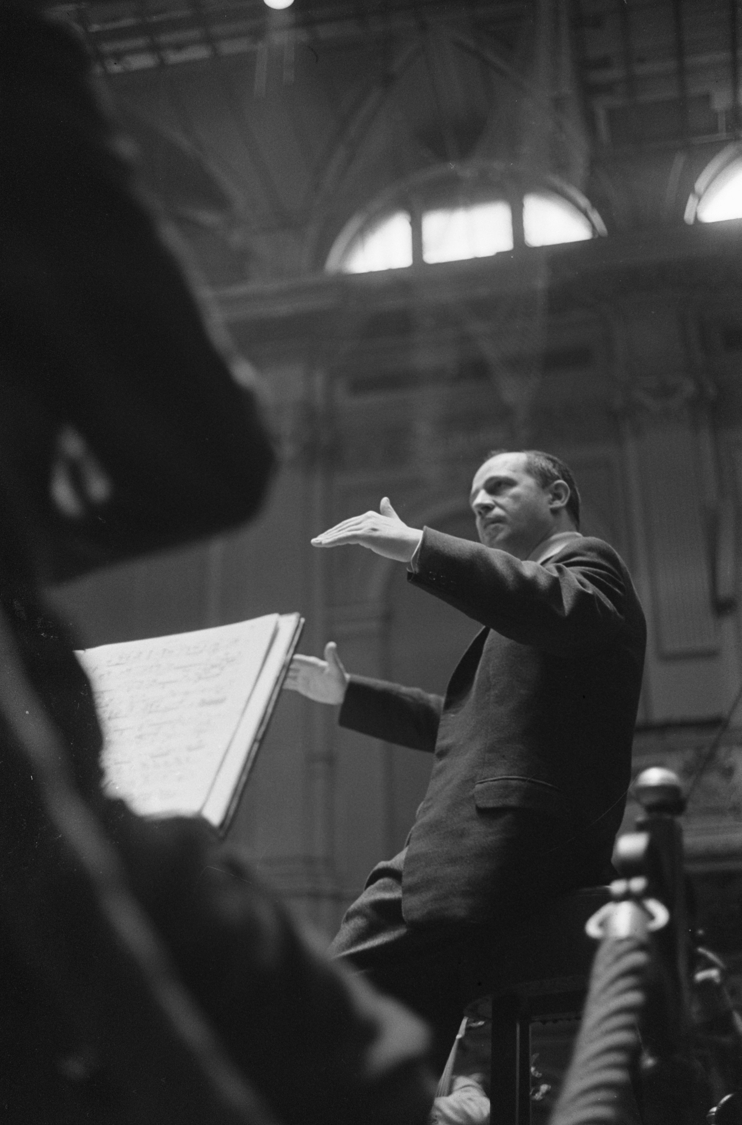 Collectie / Archief : Fotocollectie Anefo Reportage / Serie : [ onbekend ] Beschrijving : Pierre Boulez gastdirigent bij het Concertgebouworkest, Pierre Boulez Datum : 6 februari 1963 Locatie : Amsterdam Trefwoorden : dirigenten, orkesten Persoonsnaam : Boulez, Pierre Fotograaf : Pot, Harry / Anefo Auteursrechthebbende : Nationaal Archief Materiaalsoort : Negatief (zwart/wit) Nummer archiefinventaris : bekijk toegang 2.24.01.05 Bestanddeelnummer : 914-7937